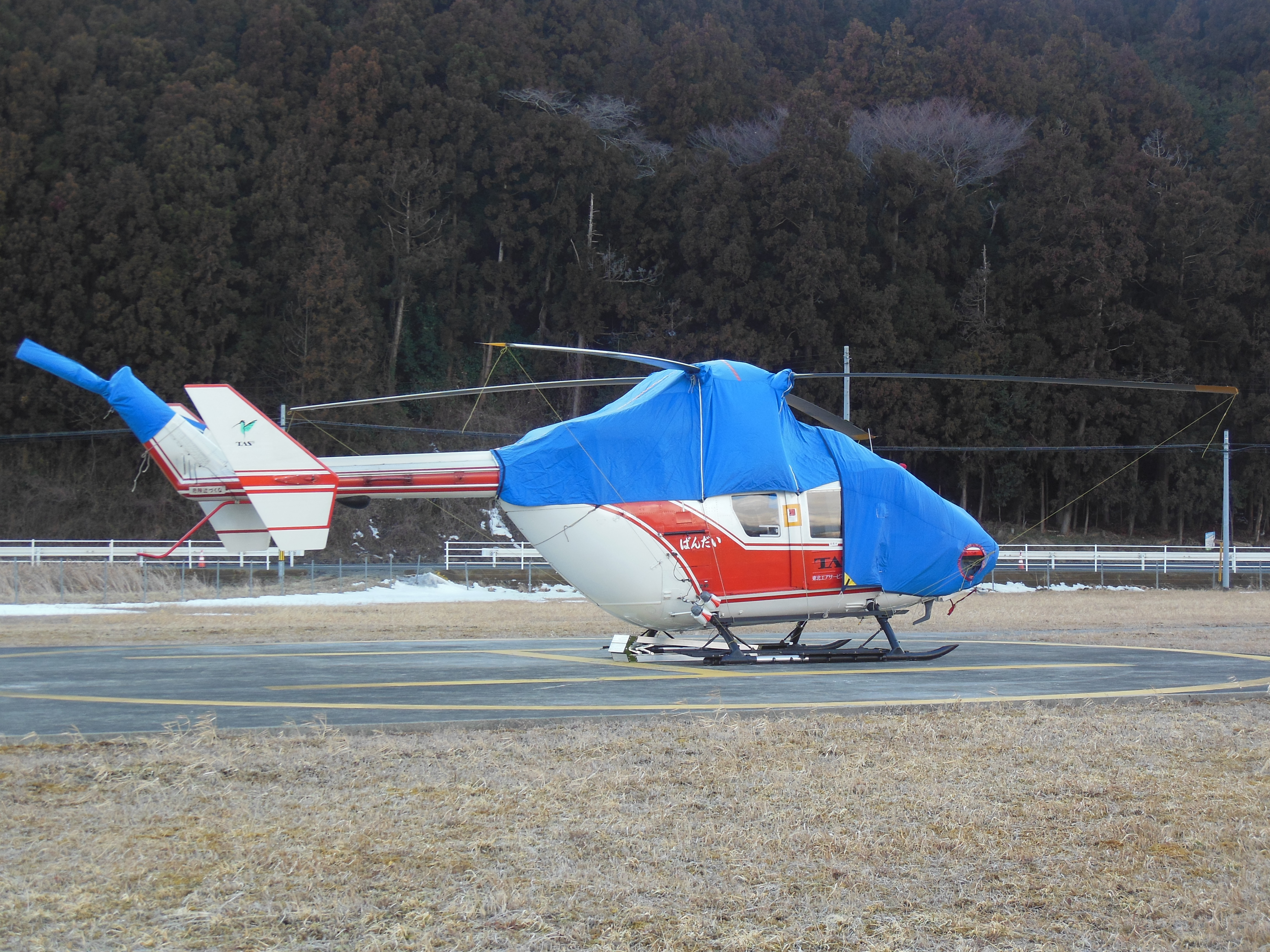 BK117B-2 Helicopter